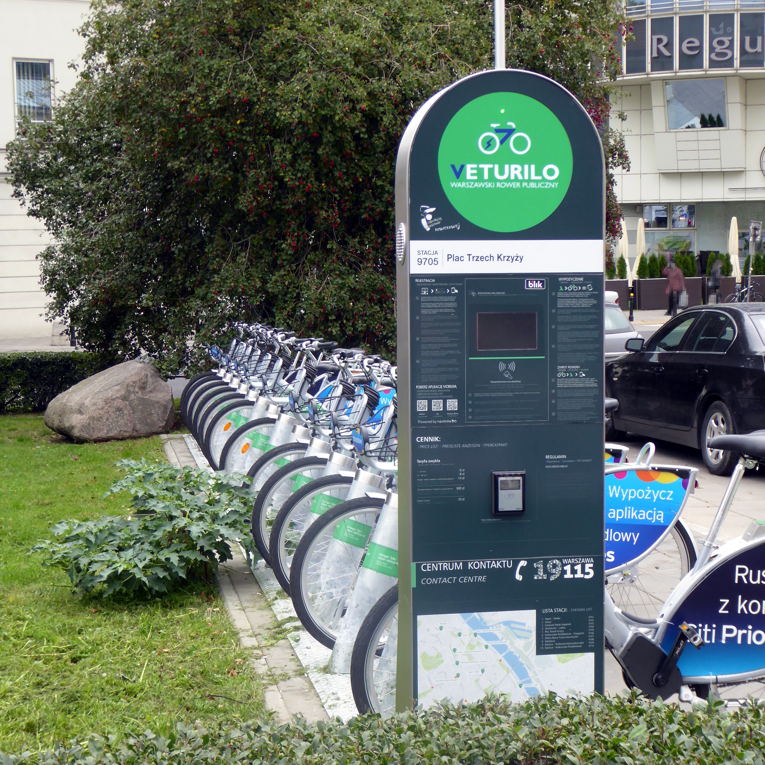 Warschau (PL), Veturilo-Leihfahrradstation am plac_Trzech_Krzyży.